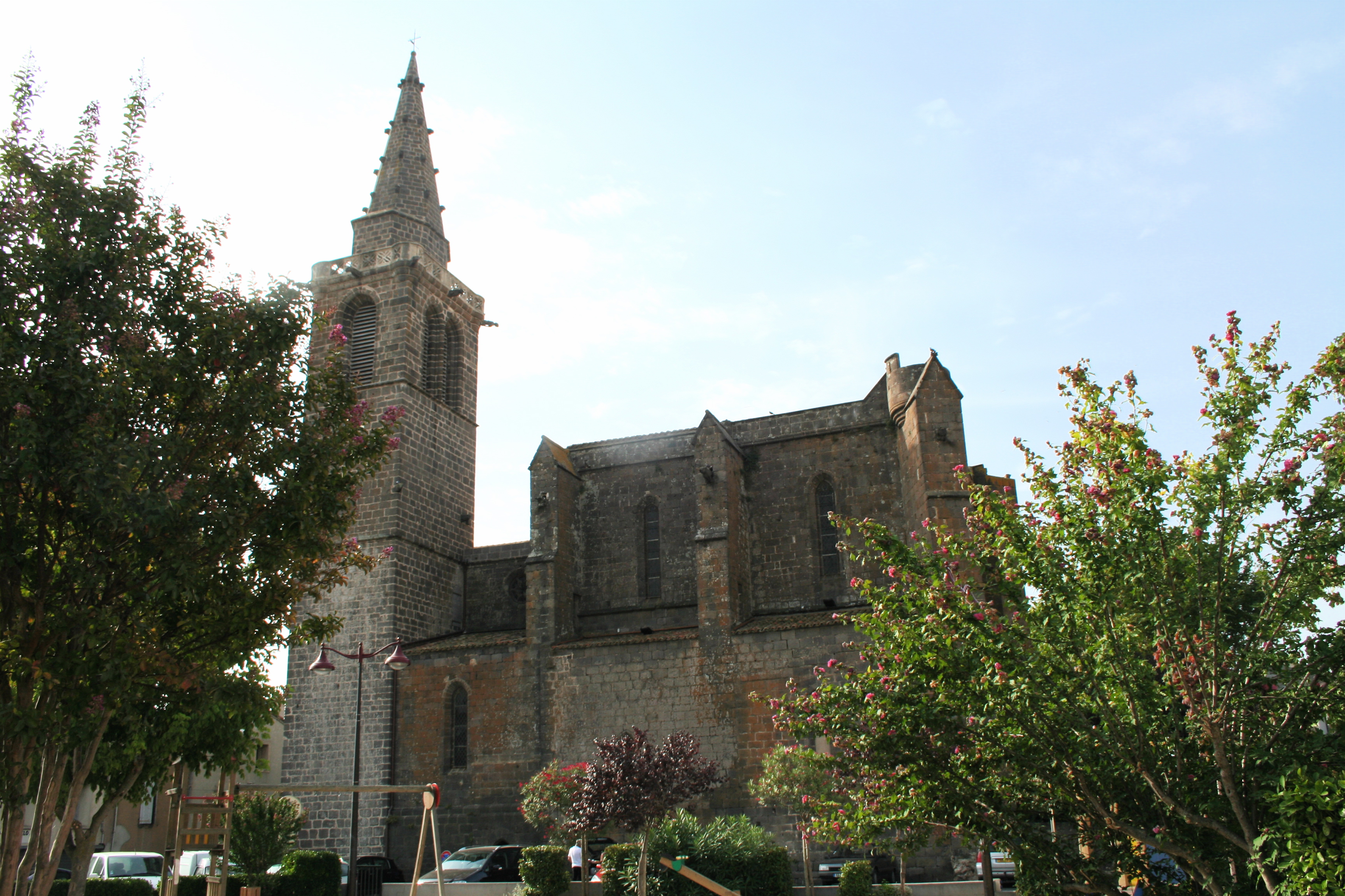 Vias (Hérault) - Façade nord de l'église Saint-Jean-Baptiste (XIVe - XVe siècles).